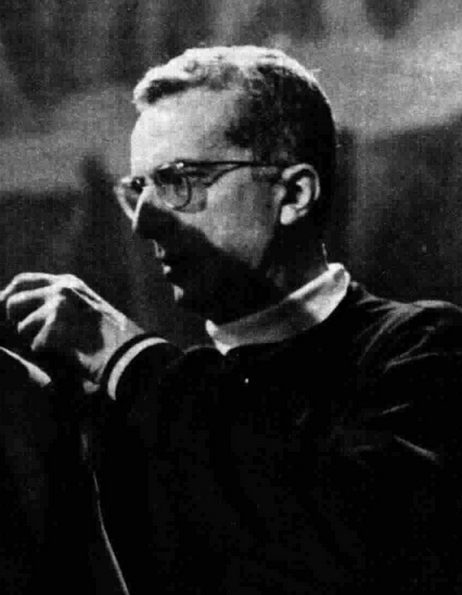 Italian stage director Orazio Costa